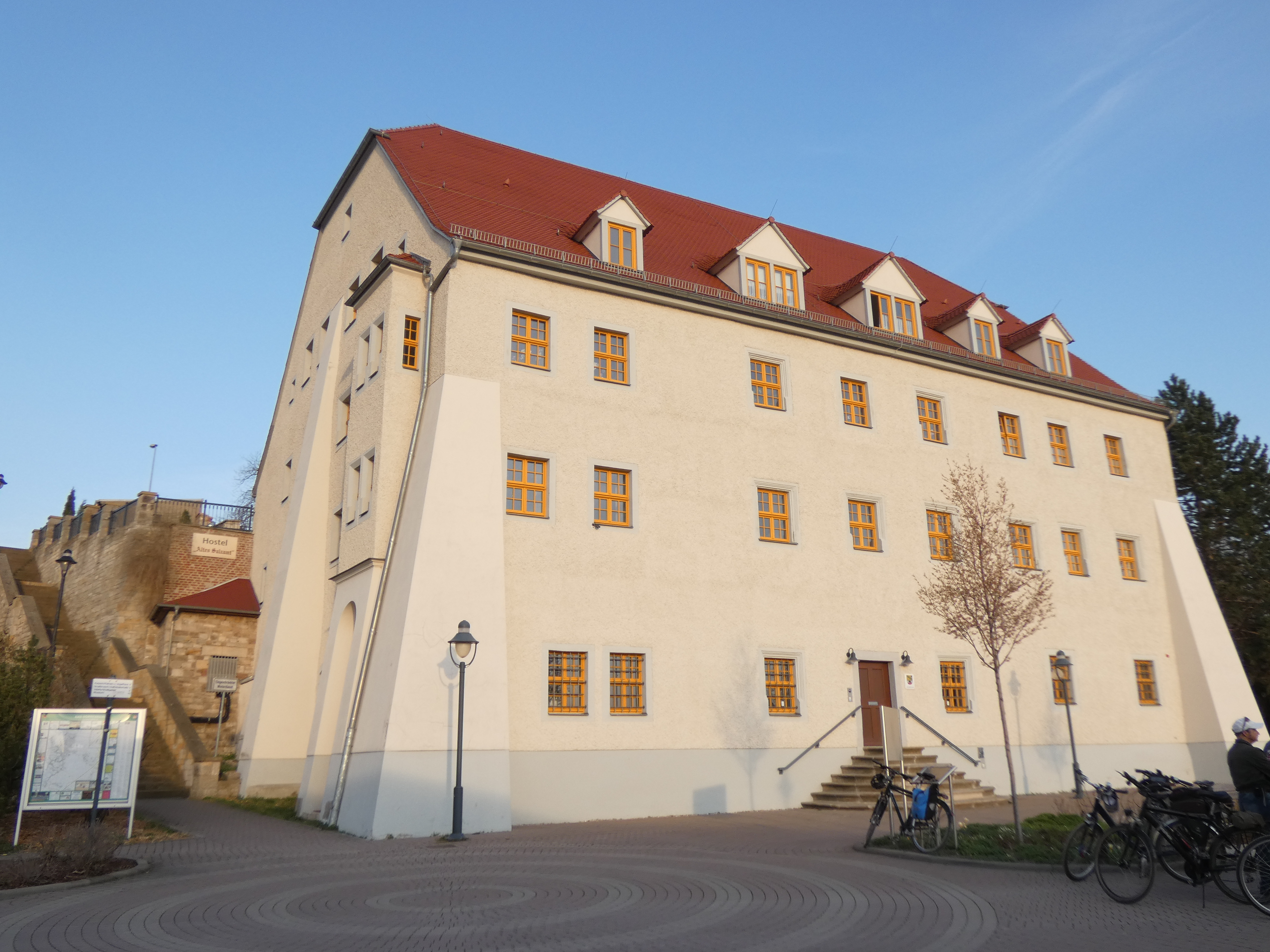 Hotel Altes Salzamt, Bad Dürrenberg, Saalekreis